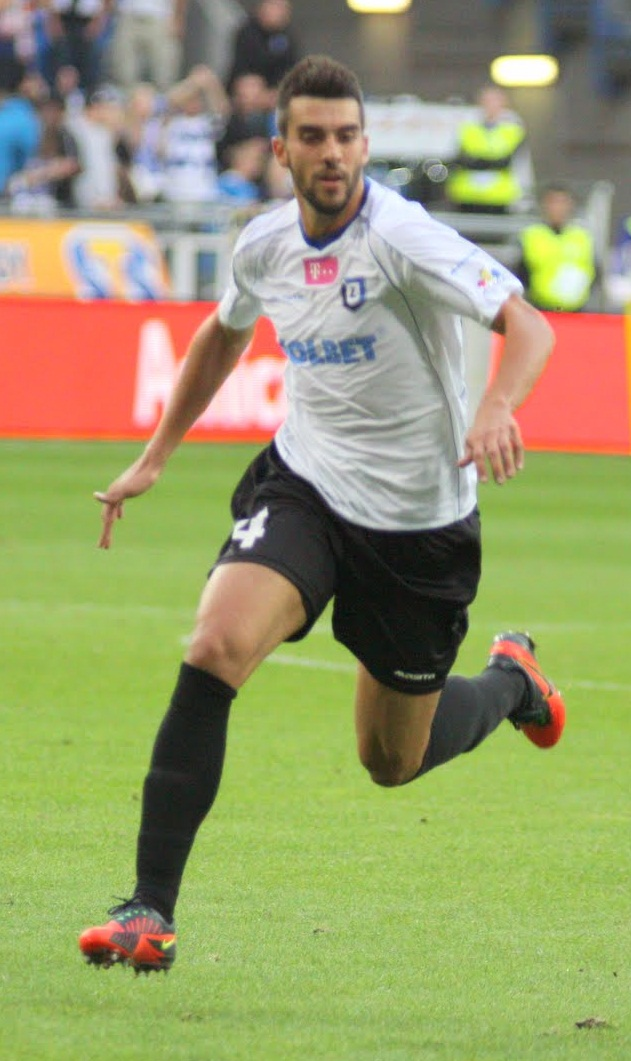 Andre Micael w barwach Zawiszy Bydgoszcz